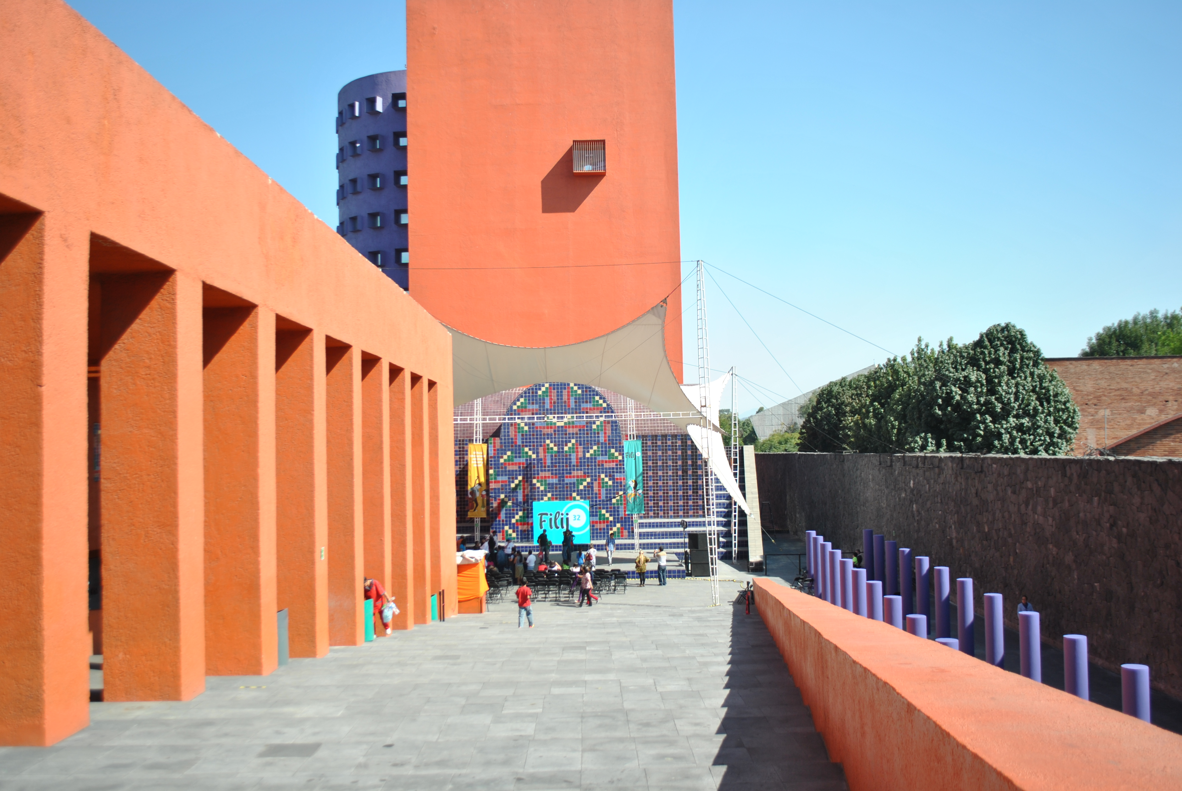 Centro Nacional de las Artes, Ciudad de México